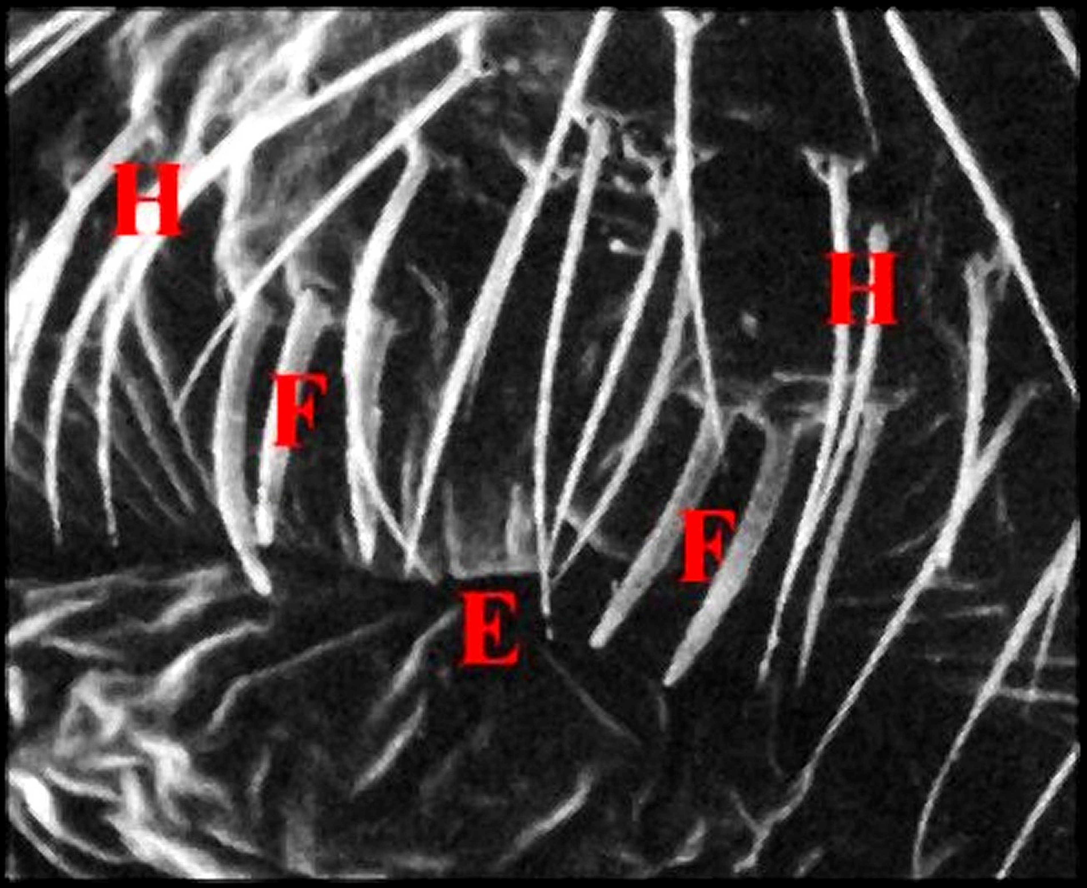 Holocnemus pluchei: fusules de glandes prégonoporales dans la région épigastrique. Microscope électronique à balayage.